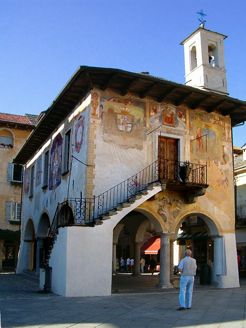 Orta San Giulio sjabloon:ItaliaanseRegio